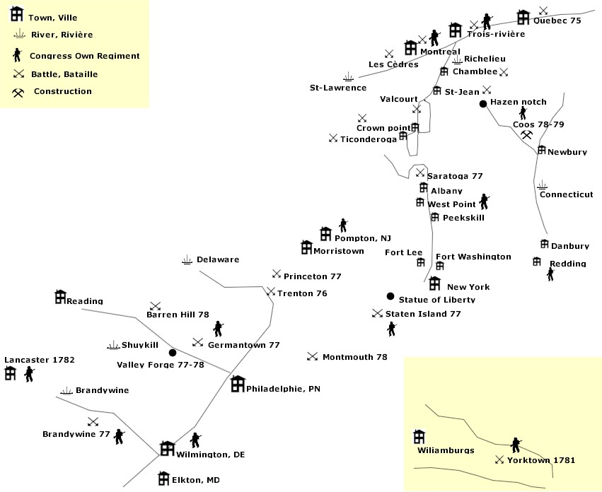 Carte schématique pour expliquer les déplacements d'un régiment. Cette carte n'est pas à l'échelle et n'est pas forcément exacte. Elle vient seulement illustrer un site autrement difficile à comprendre.